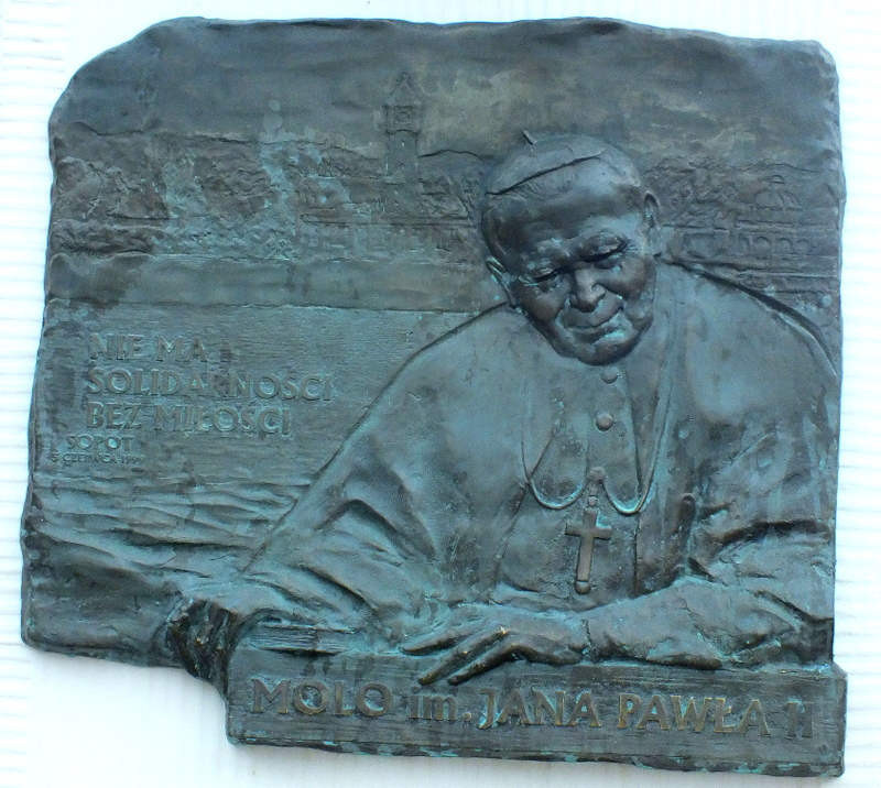 Sopot, molo im. Jana Pawła II. Na pamiątkowej tablicy poświęconej przez abp Tadeusza Gocłowskiego, metropolitę gdańskiego, widnieje wizerunek Jana Pawła II i zdanie, zaczerpnięte z homilii wygłoszonej przez niego na sopockim hipodromie w roku 1999: "Nie ma solidarności bez miłości"